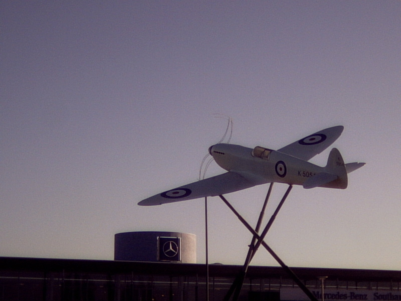 Модель Supermarine Spitfire в аэропорту Саутгемптона.